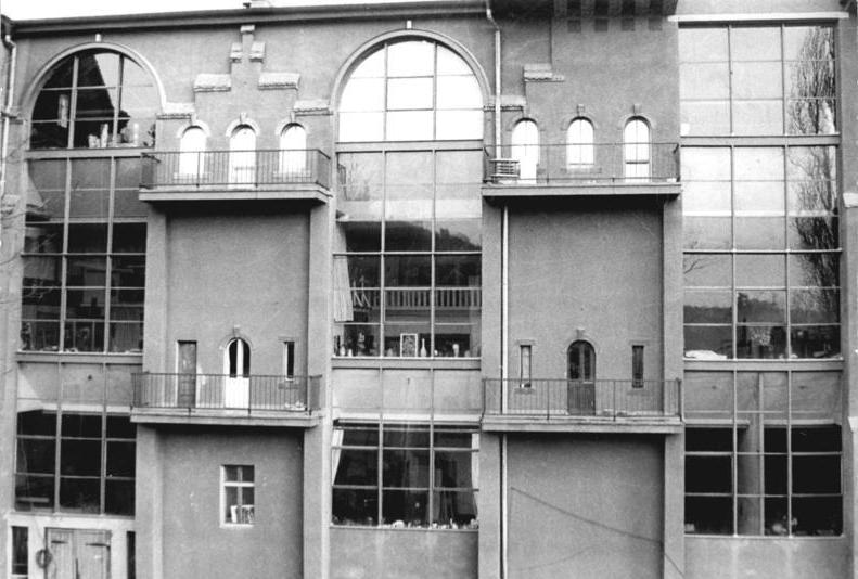 ADN-ZB-Häßler-25.4.84-Dresden: Künstlerhang rekonstruiert. Das Atelierhaus des Dresdener Künstlerdomizils am Löschwitzer Elbhang wurde in den zurückliegenden Jahren umfangreich rekonstruiert. Diese Wohn- und Arbeitsstätte für Maler und Bildhauer ist die Einzige ihrer Art in der DDR. Gebaut wurde sie 1897-98 nach Entwürfen des Dresdener Architekten Martin Pietzsch. Zum Haus gehören 17 Ateliere und 13 Wohnungen. Unter den Mietern sind Namen bekannter Künstler wie Josef Hegenbarth, Hans Unger, Sascha Schneider und Hans Jüchser.